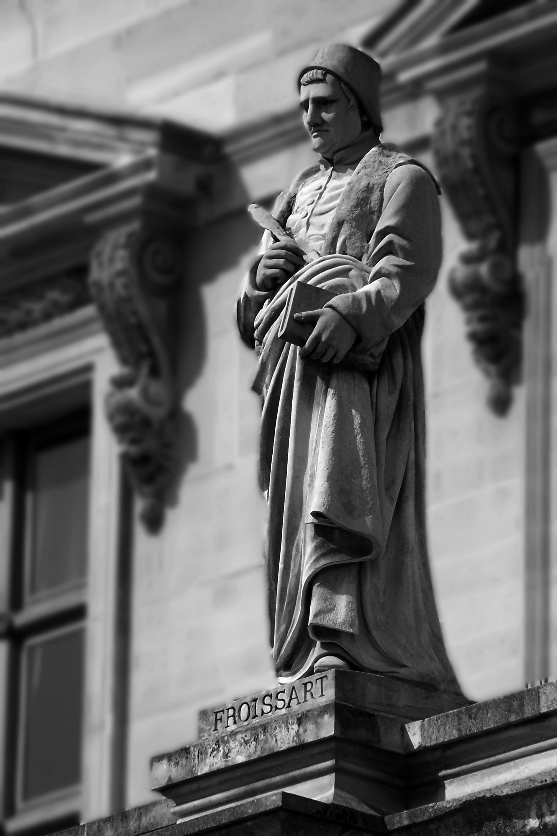 Photo de la statue de Jehan Froissart par Philippe Lemaire, placée dans la Cour du Louvre (devant la pyramide)